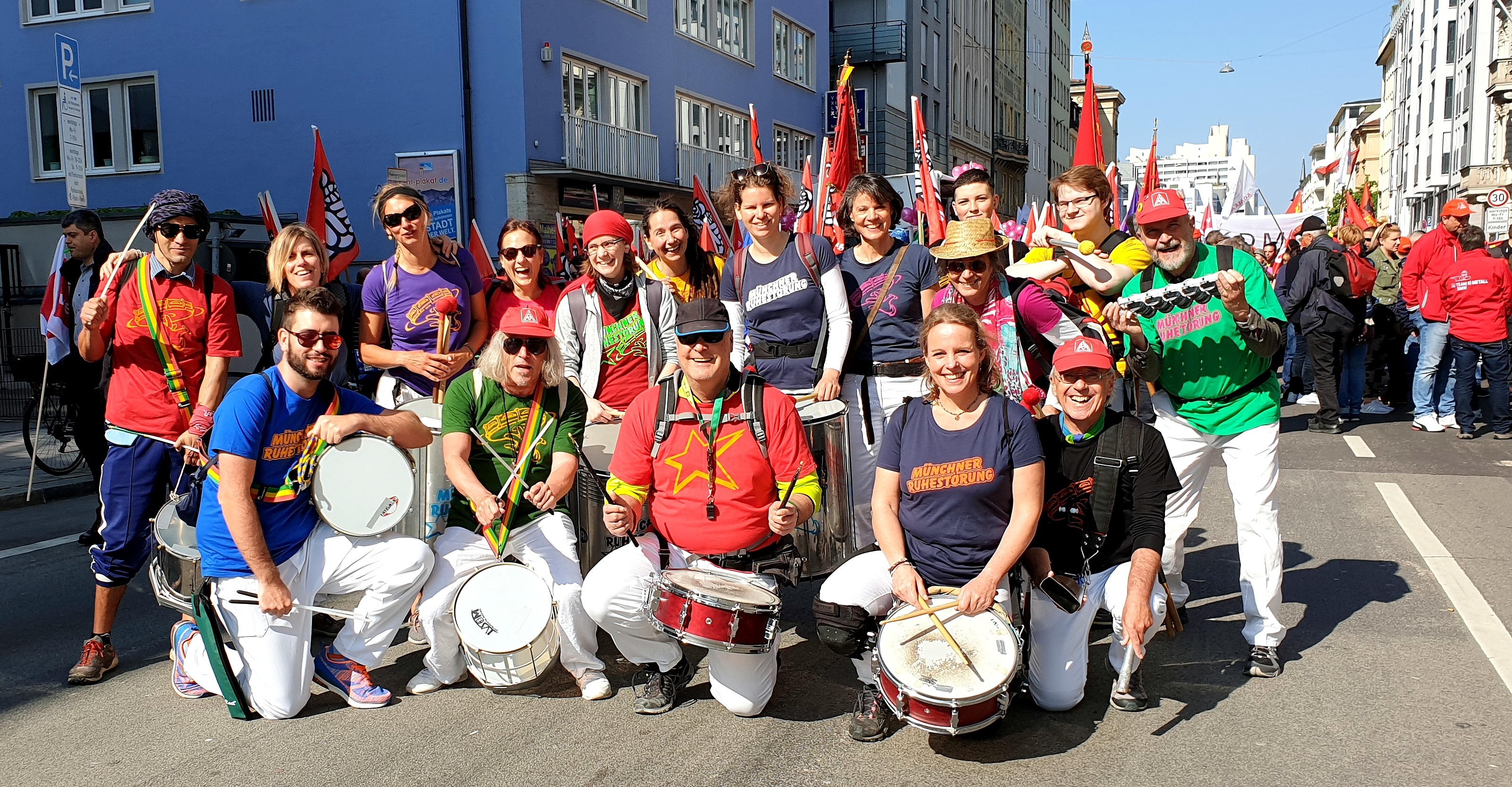 Münchner Ruhestörung 2019 bei DGB-Demonstration zum 1. Mai in München